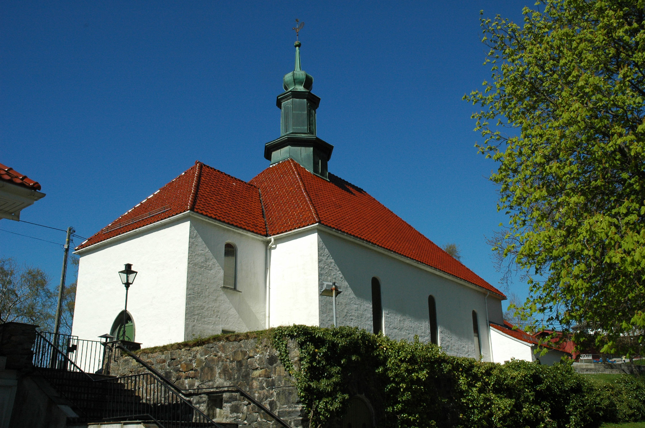 Salhus kirke, Bergen